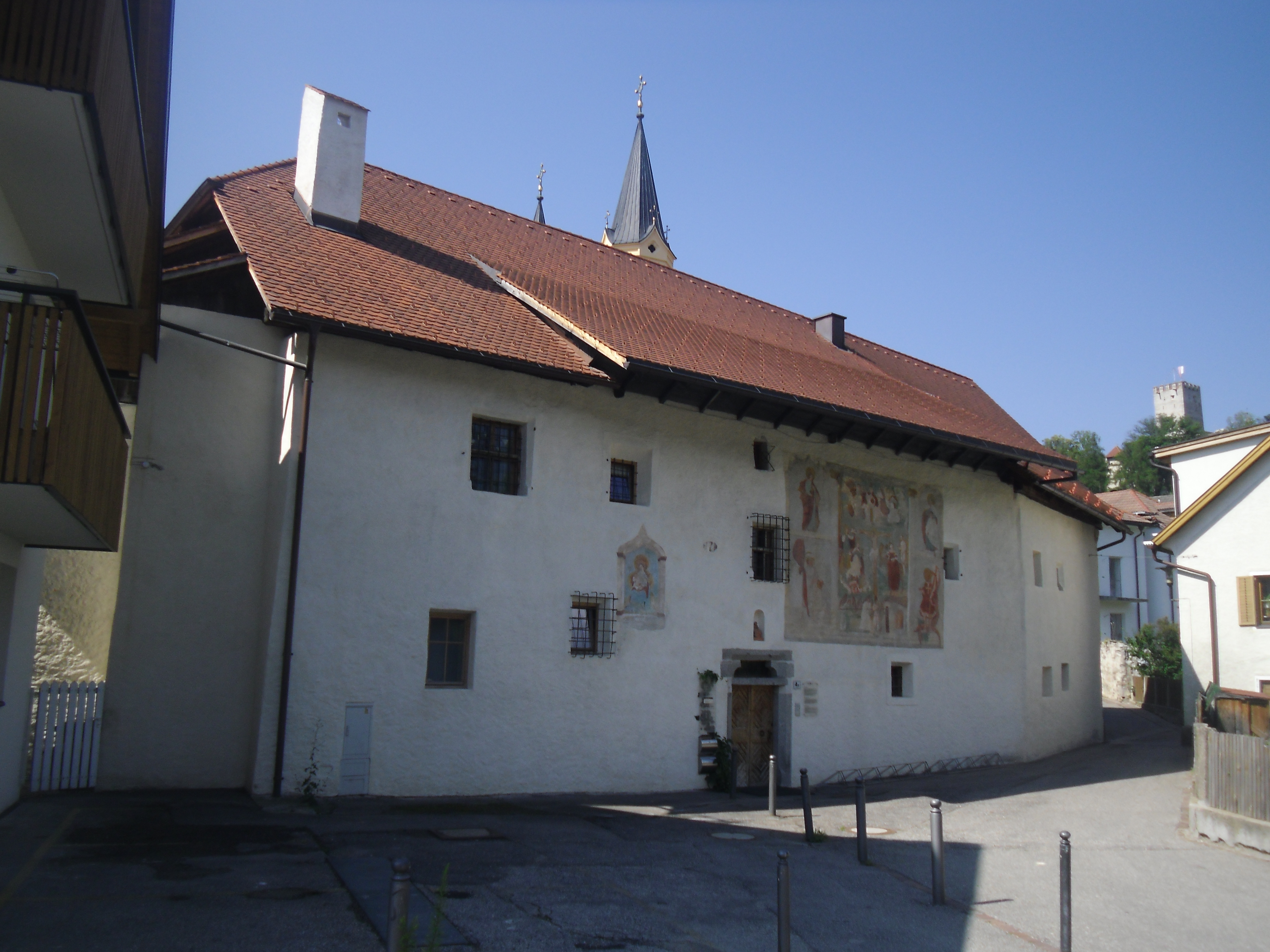 Mühlgasse 4 in Bruneck (Südtirol)